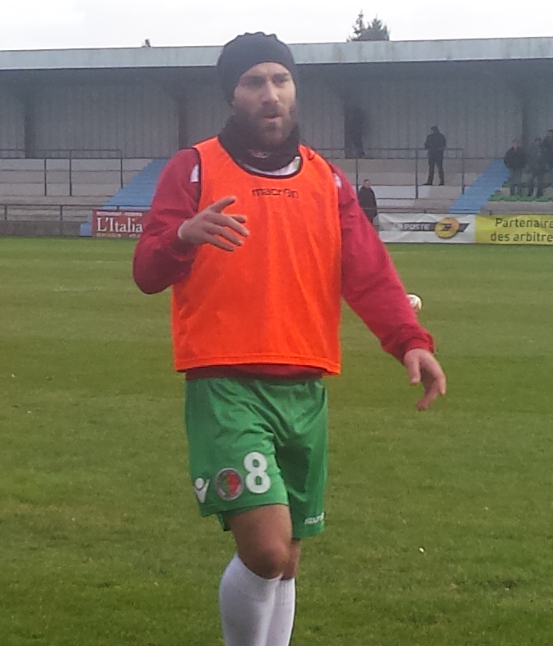 Baptiste Anziani avant le match Lens B - Sedan, au Stade François-Blin d'Avion, match comptant pour le championnat de France de CFA (quatrième division française), le 24 janvier 2015.